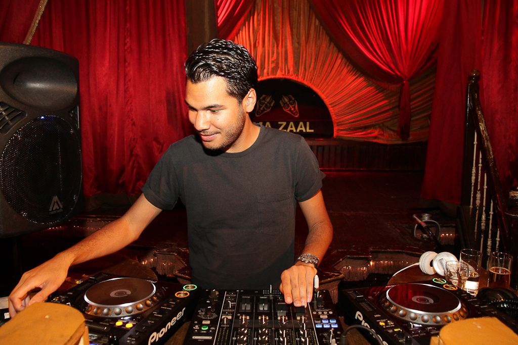 DJ Marc Benjamin